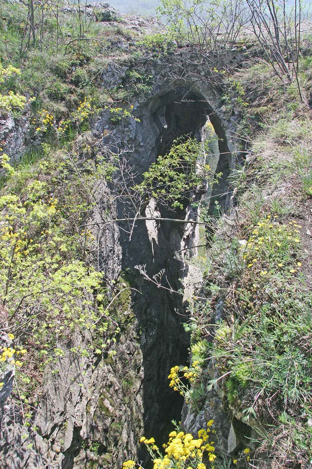 obrázek Jelínkova mostu na Kotýz autor:Zp